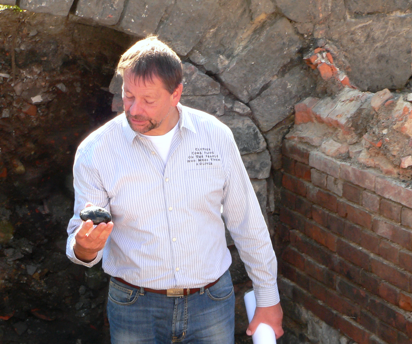 Archäologe Peter Steppuhn mit einem auf der Glashütte Klein Süntel ausgegrabenen Glättglas